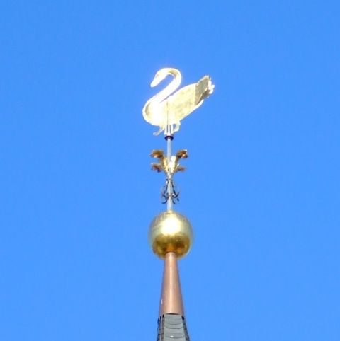 Detail torenspits van de Evangelische kerk in Monschau